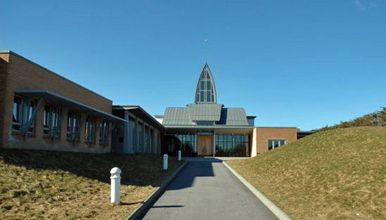 Udland kirke, Haugesund